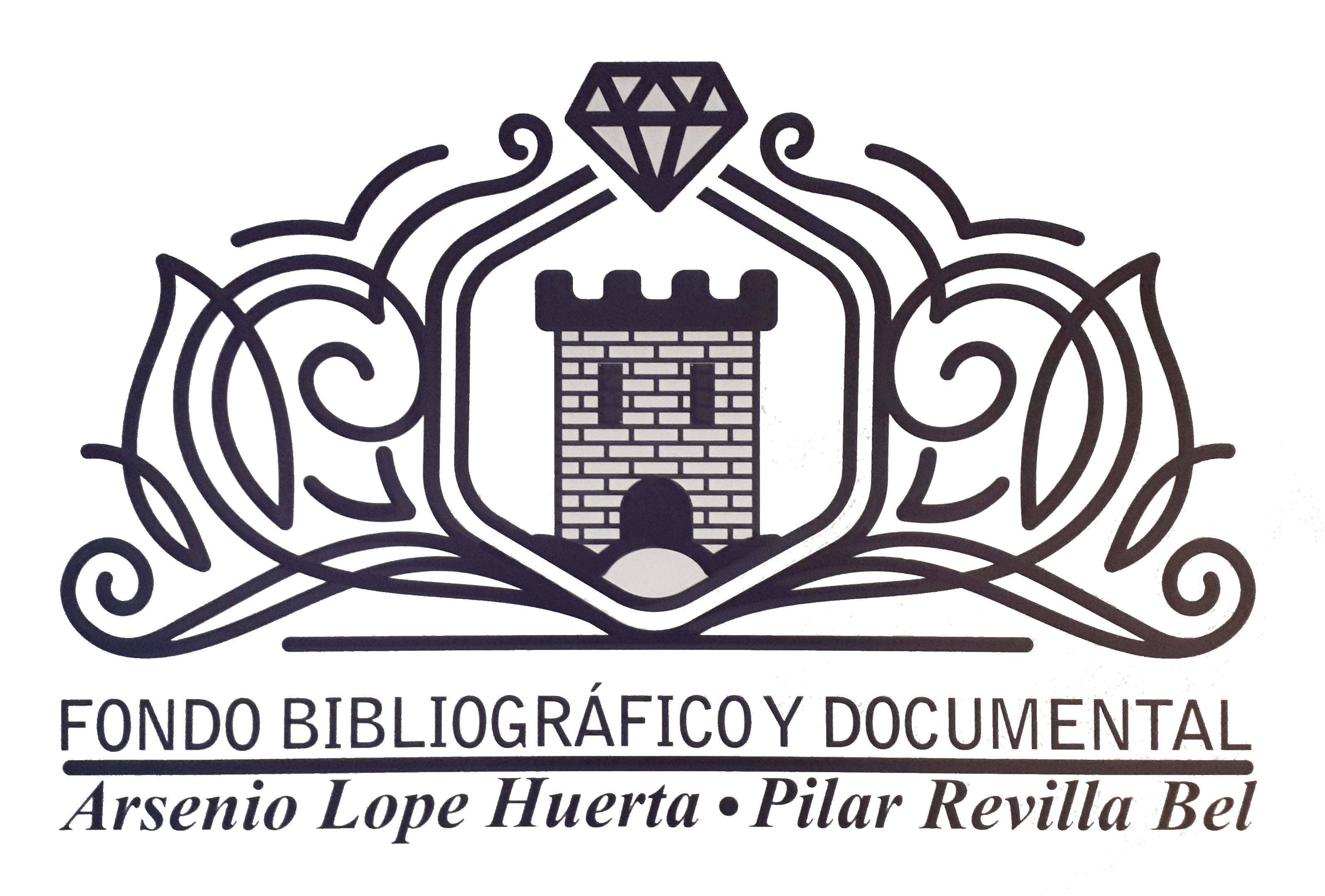 Logotipo del "Legado Arsenio Lope Huerta y Pilar Revilla Bel", depositado en el Archivo Municipal del Ayuntamiento de Alcalá de Henares en 2020.